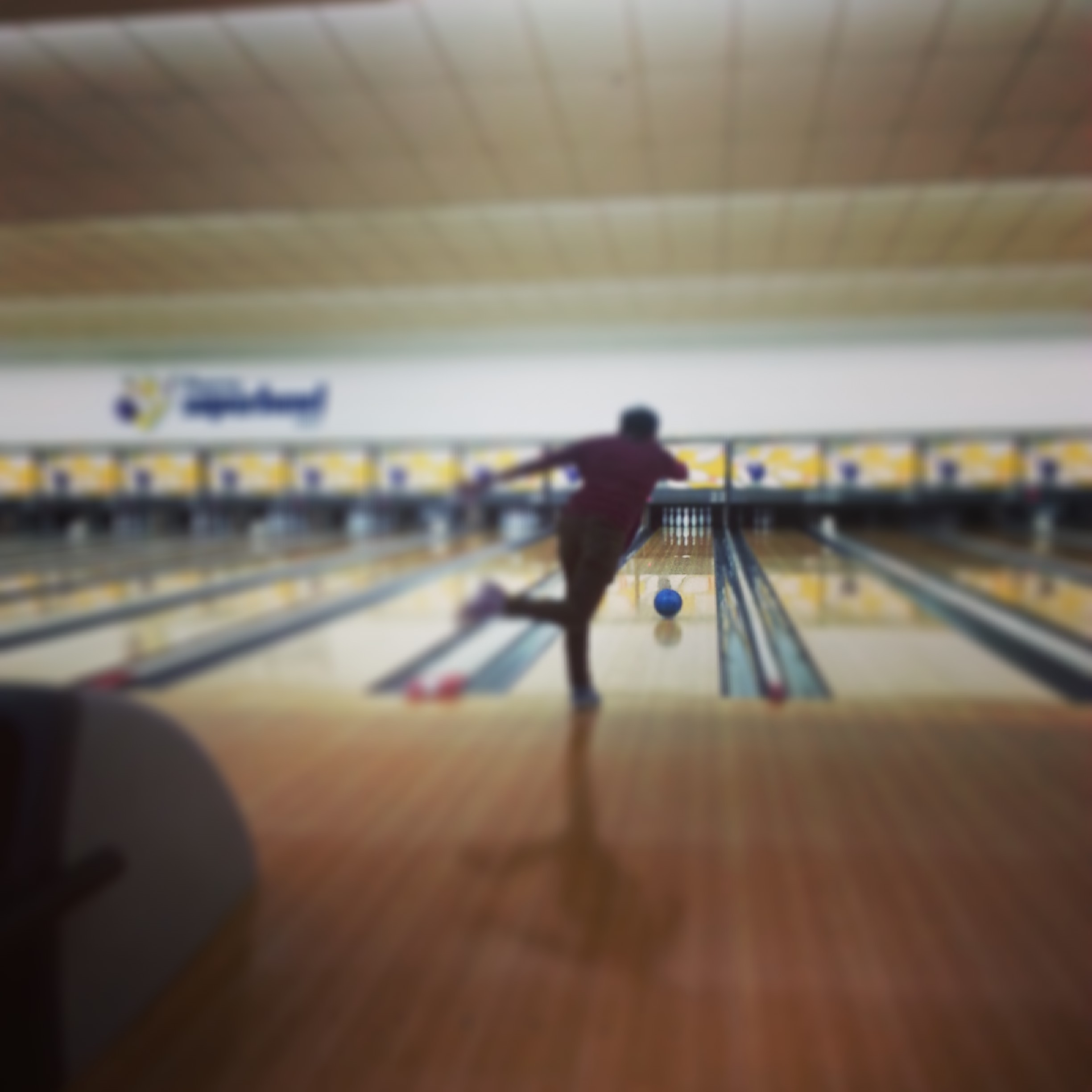 Tenpin